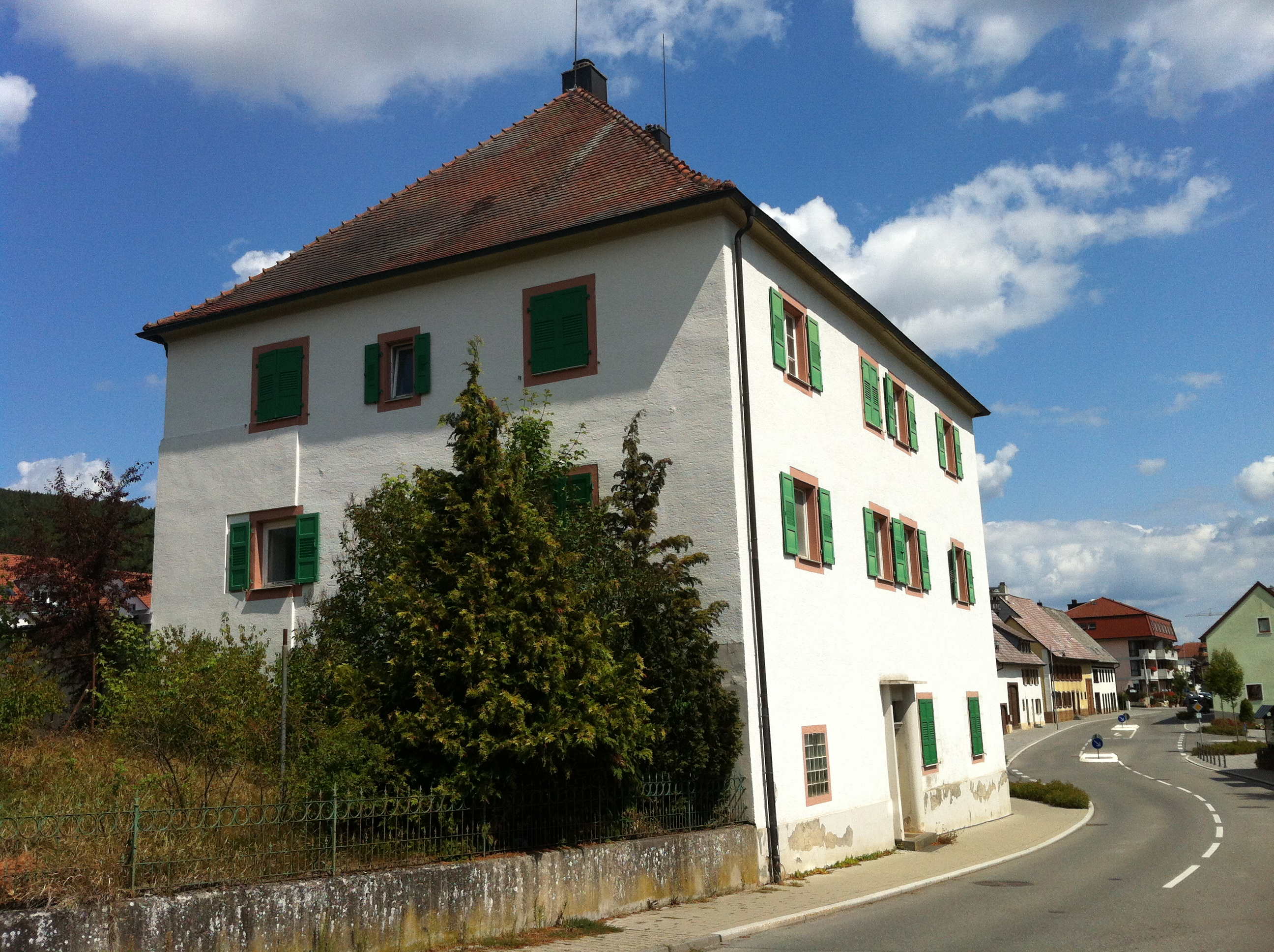 Blumberg, Stadt im Schwarzwald-Baar-Kreis. Katholisches Pfarrhaus, nach Abriss des Vorgängerbaus von 1655 vom fürstenbergischen Baumeister Joseph Saltzmann 1751 errichtet. 1875 bis 1907 altkatholisches Amt; bis 1960 Amtssitz und Wohnung des katholischen Geistlichen.